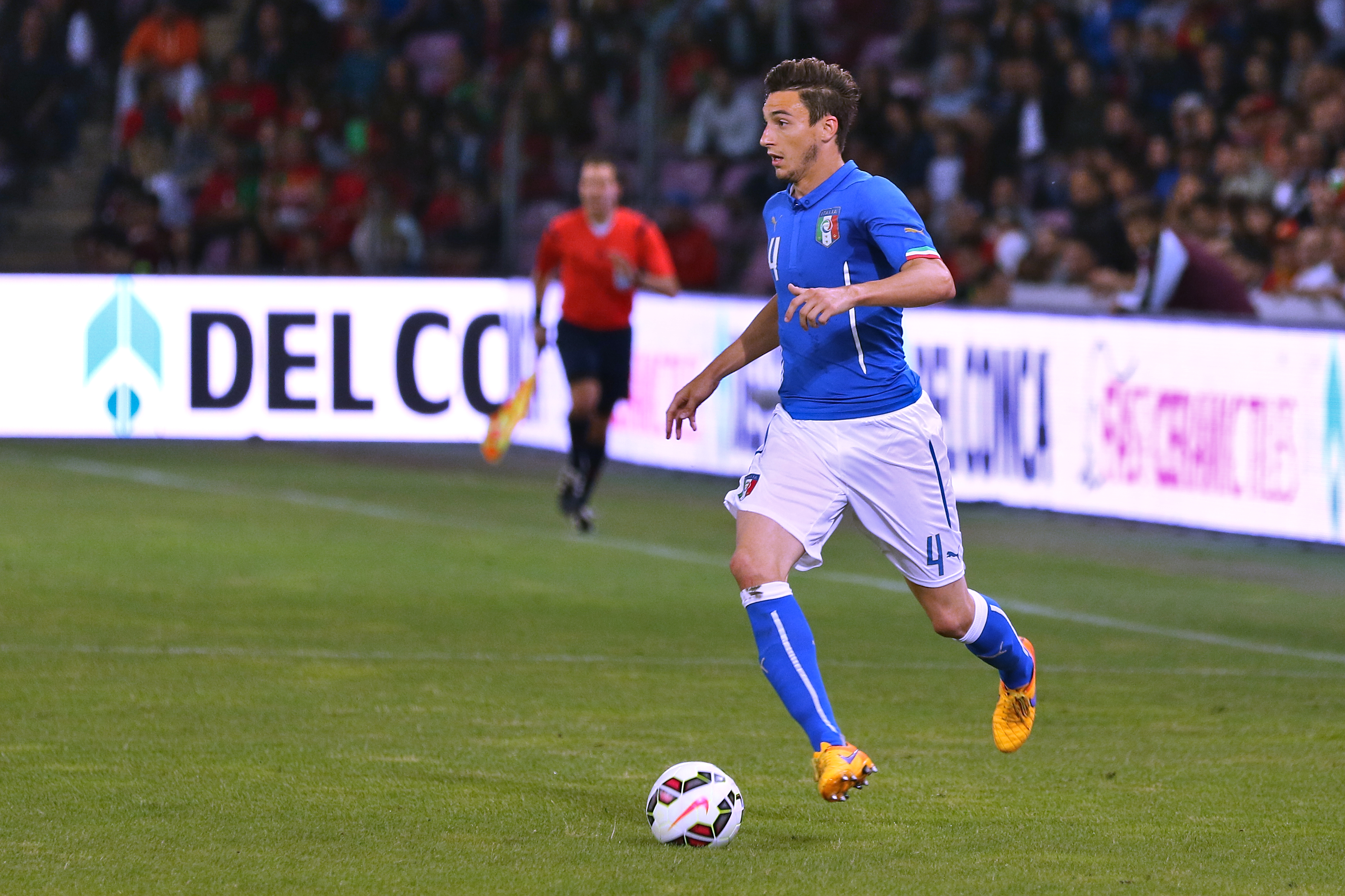 20150616 - Portugal - Italie - Genève - Matteo Darmian